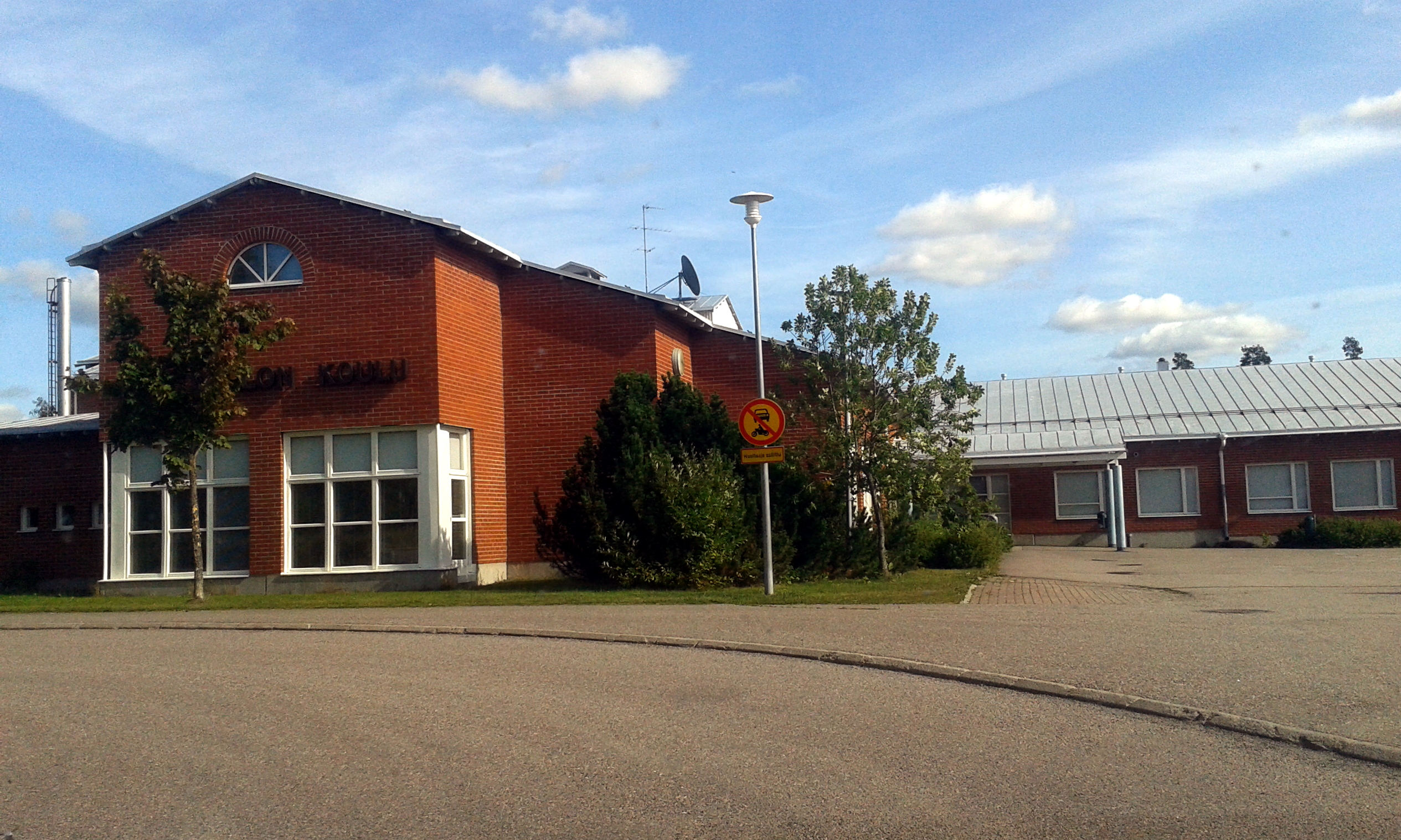 Mäntysalo School in Klaukkala